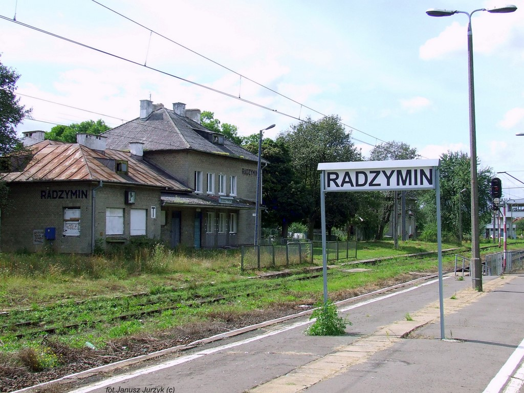 Radzymin